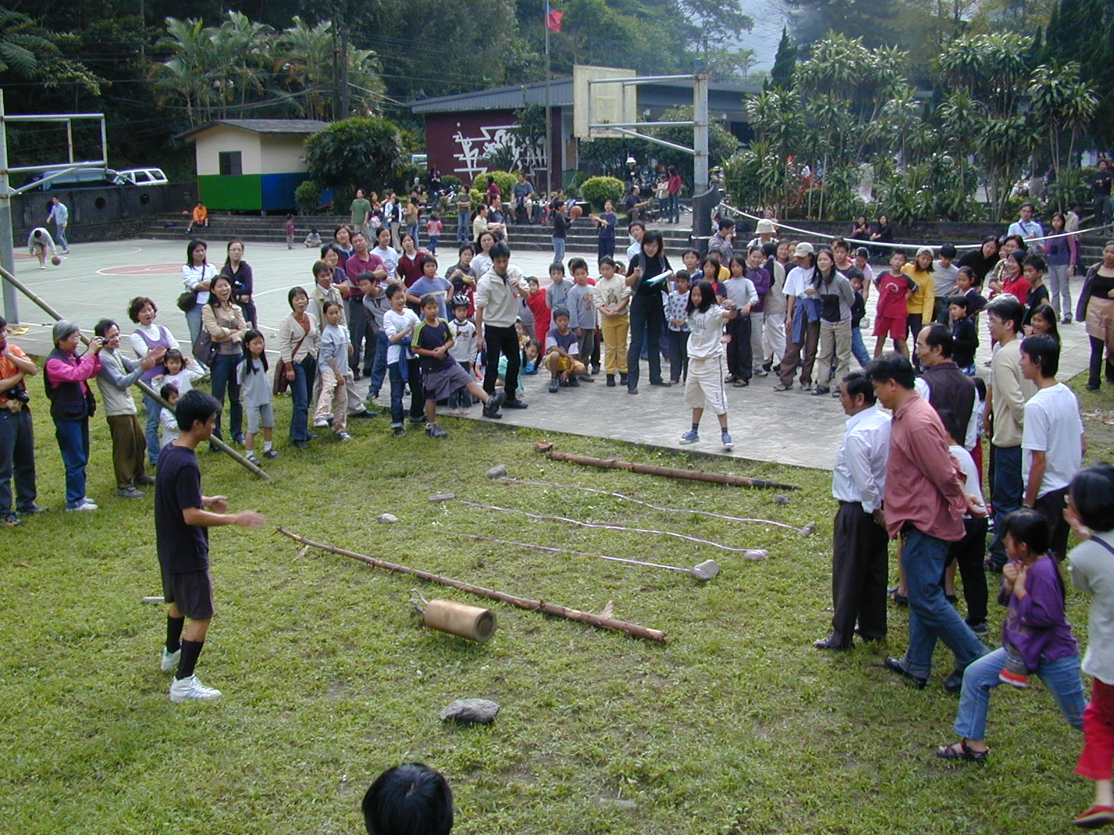 臺北縣烏來鄉信賢村種籽親子實驗小學文化日